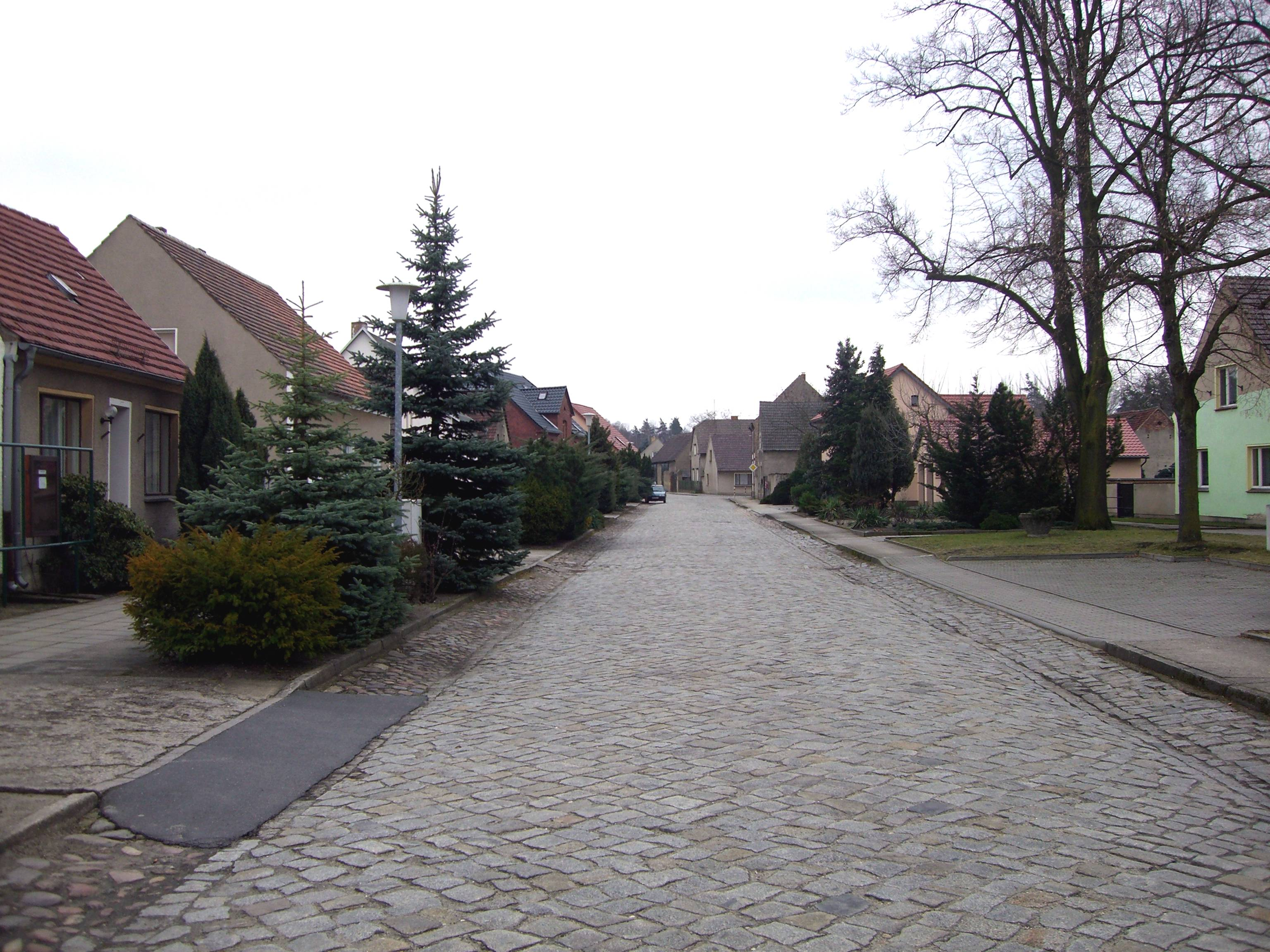 Tröbitz, Hauptstraße